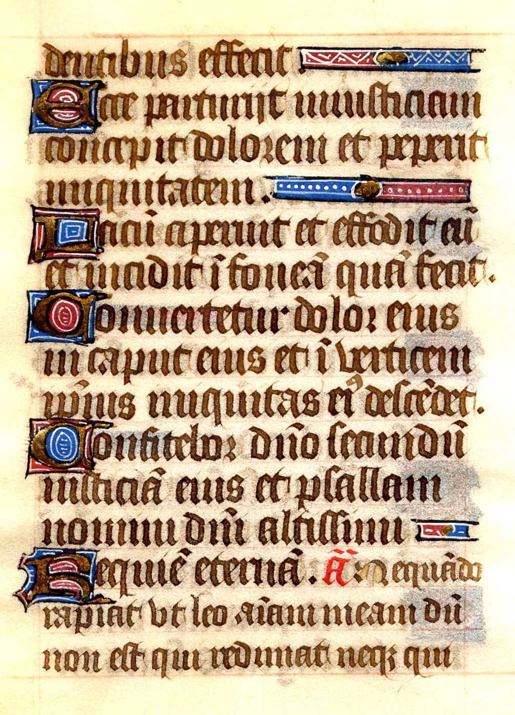 Psalm 7 from a French book of hours